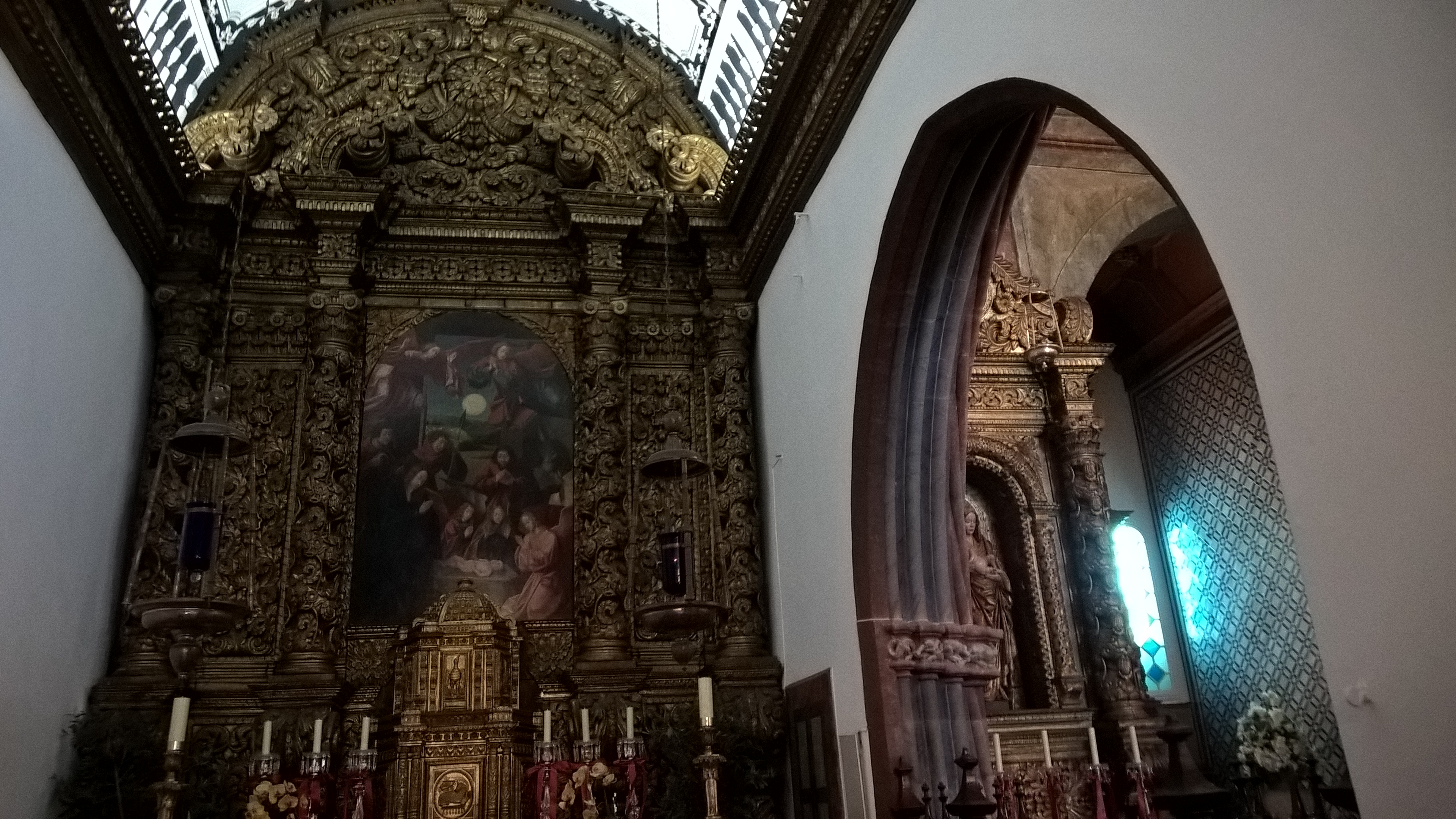 Retábulo da Capela dos Reis Magos na Igreja Matriz da Ribeira Brava, na ilha da Madeira.